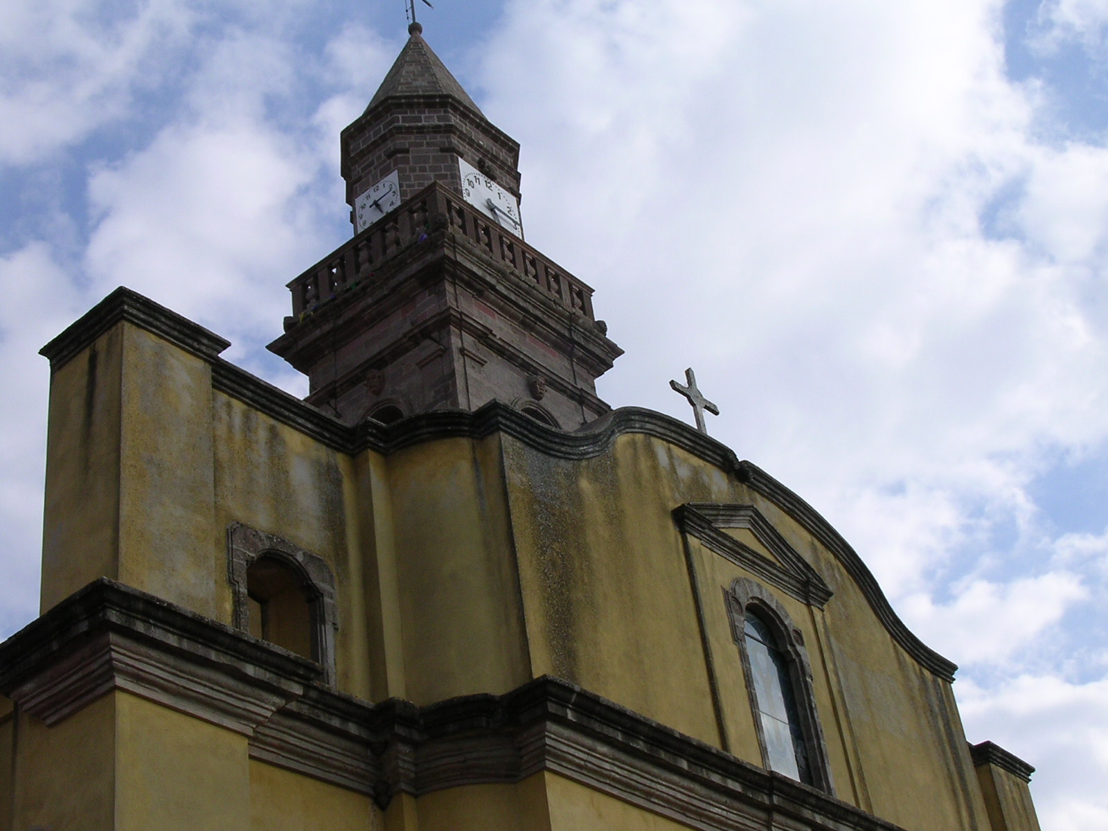 Chiesa parrochiale di S.Nicola a Ortueri. Autore: Lupani